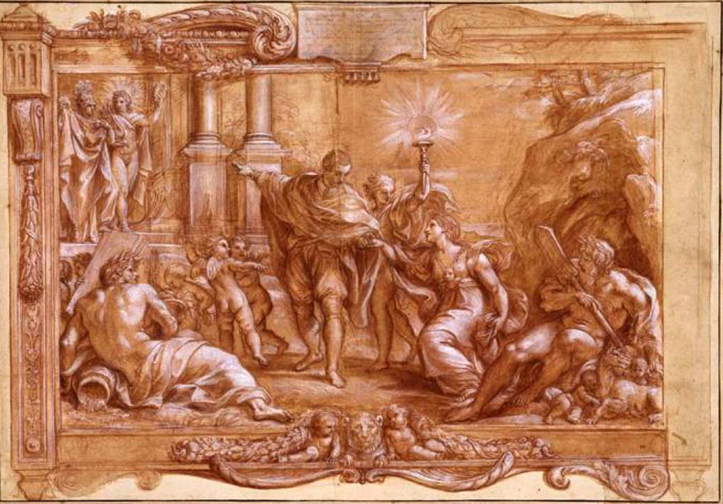 Allegoria di Annibale Carracci